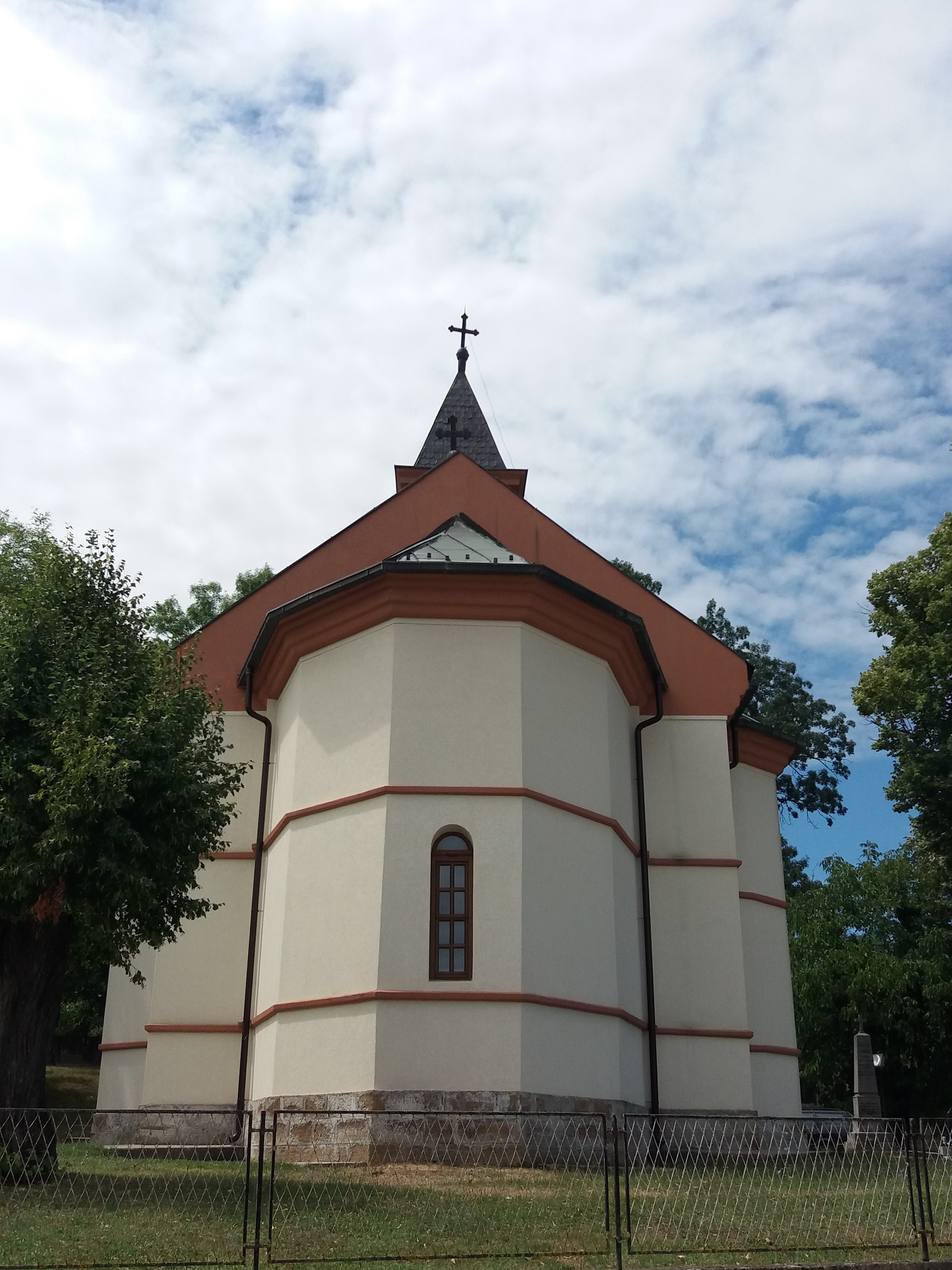 Srpski (latinica): Crkva Svetog Arhangela Gavrila, Baničina